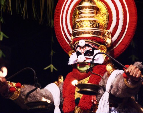 പ്രവേശികം